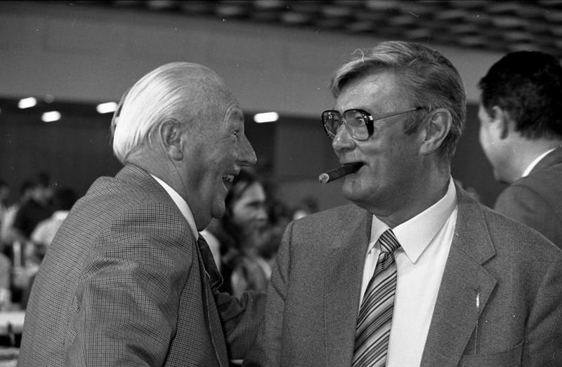 32. Ordentlicher Parteitag der FDP in der Halle 8 des Kölner Messegeländes.